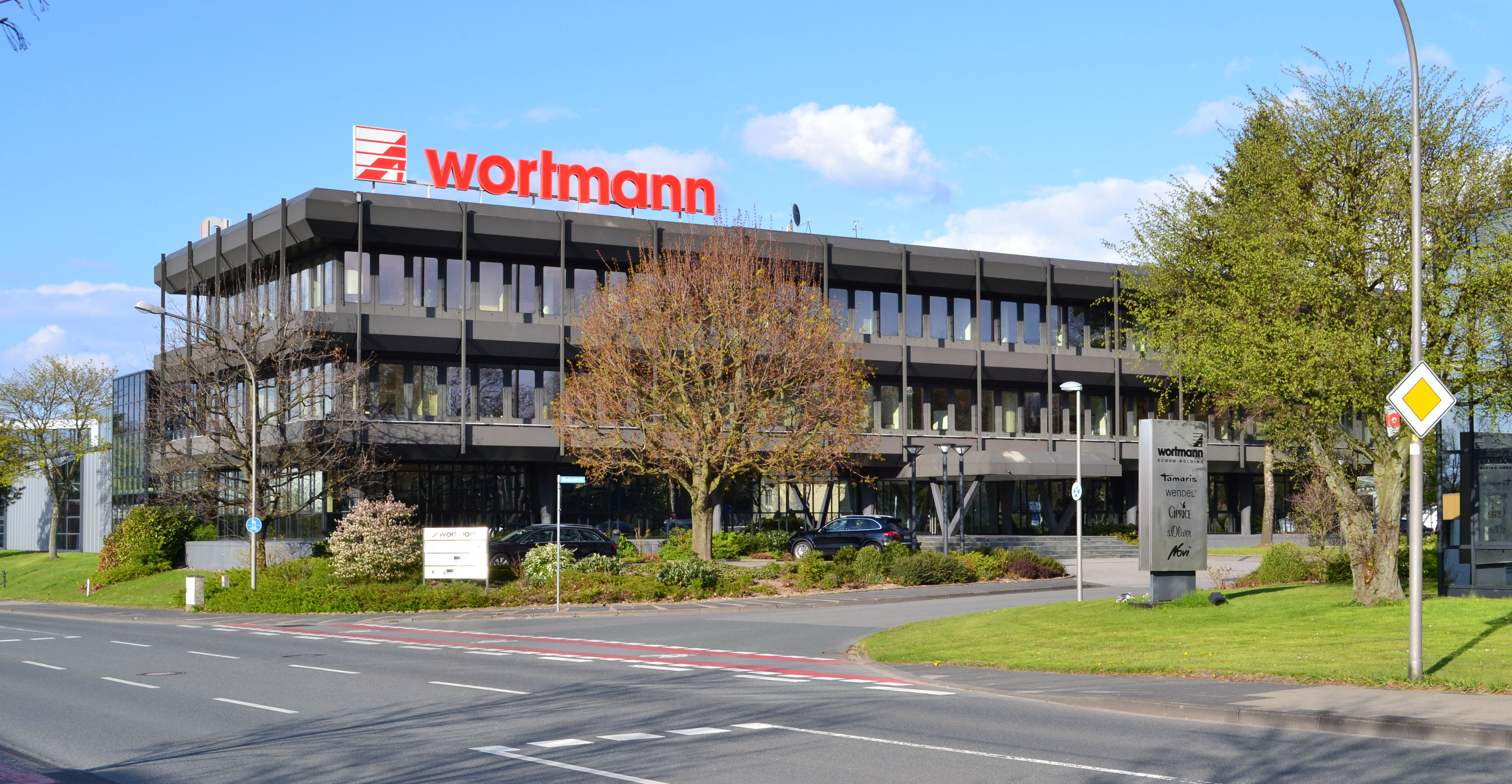 Verwaltungsgebäude der Wortmann Schuh-Holding, Detmold, Klingenbergstraße 1